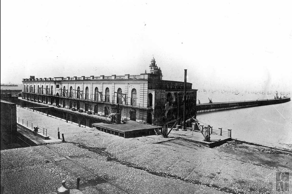 Aduana Taylor y muelle de cargas visto desde atrás